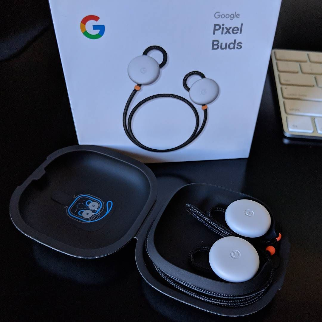 via Instagram/robertnelson ift.tt/2mylSqD